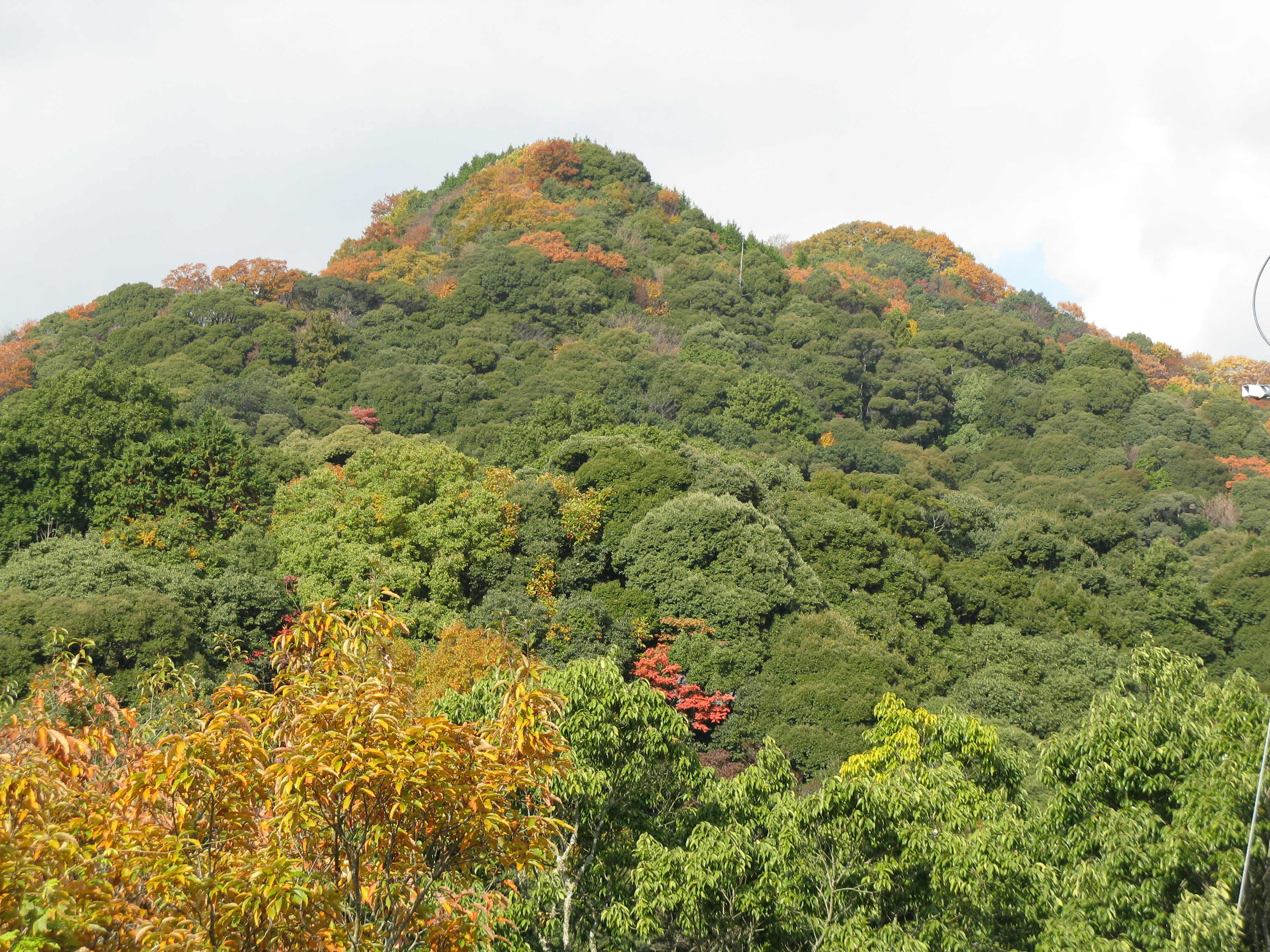 信貴山